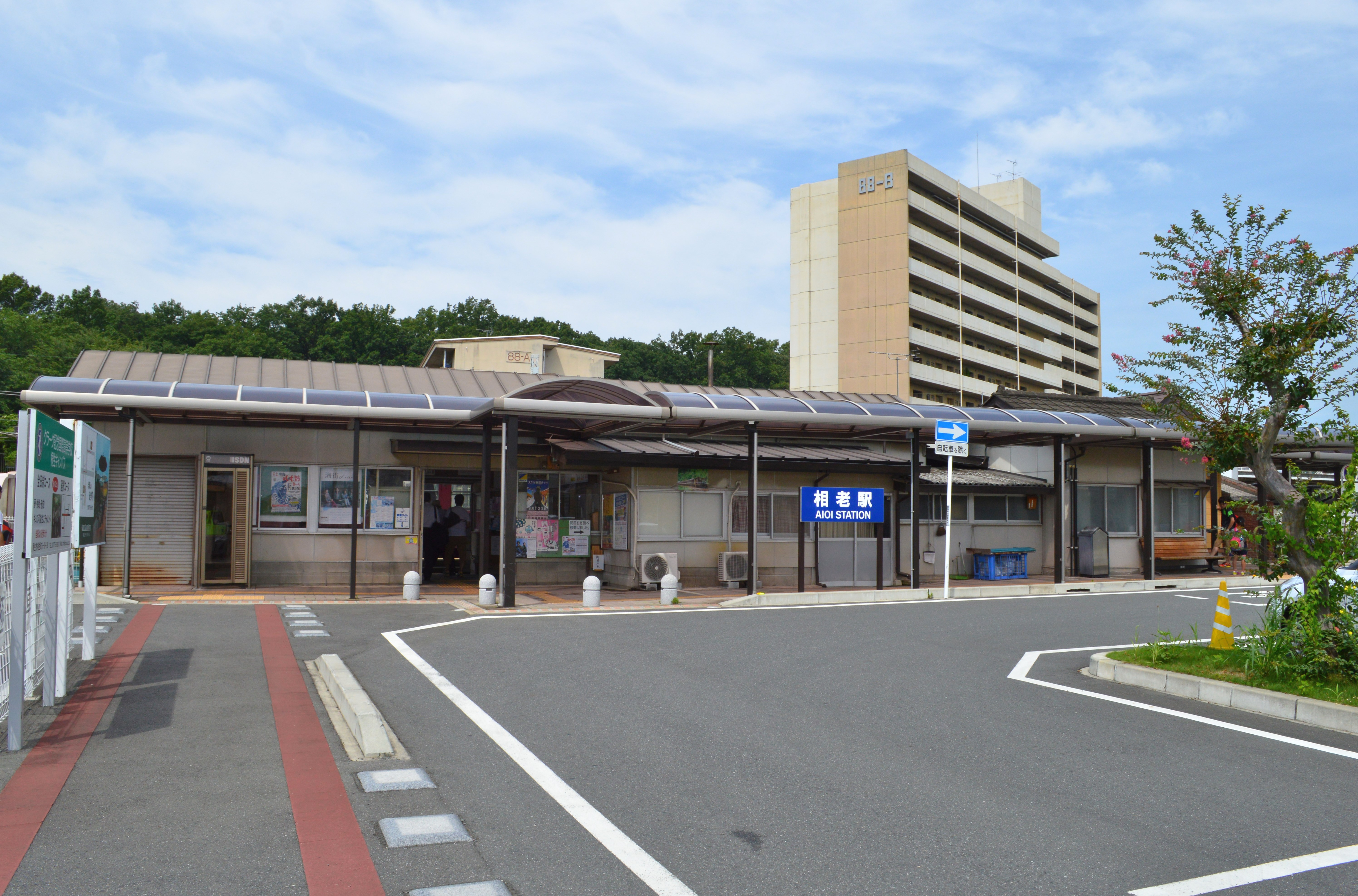 相老駅 駅舎